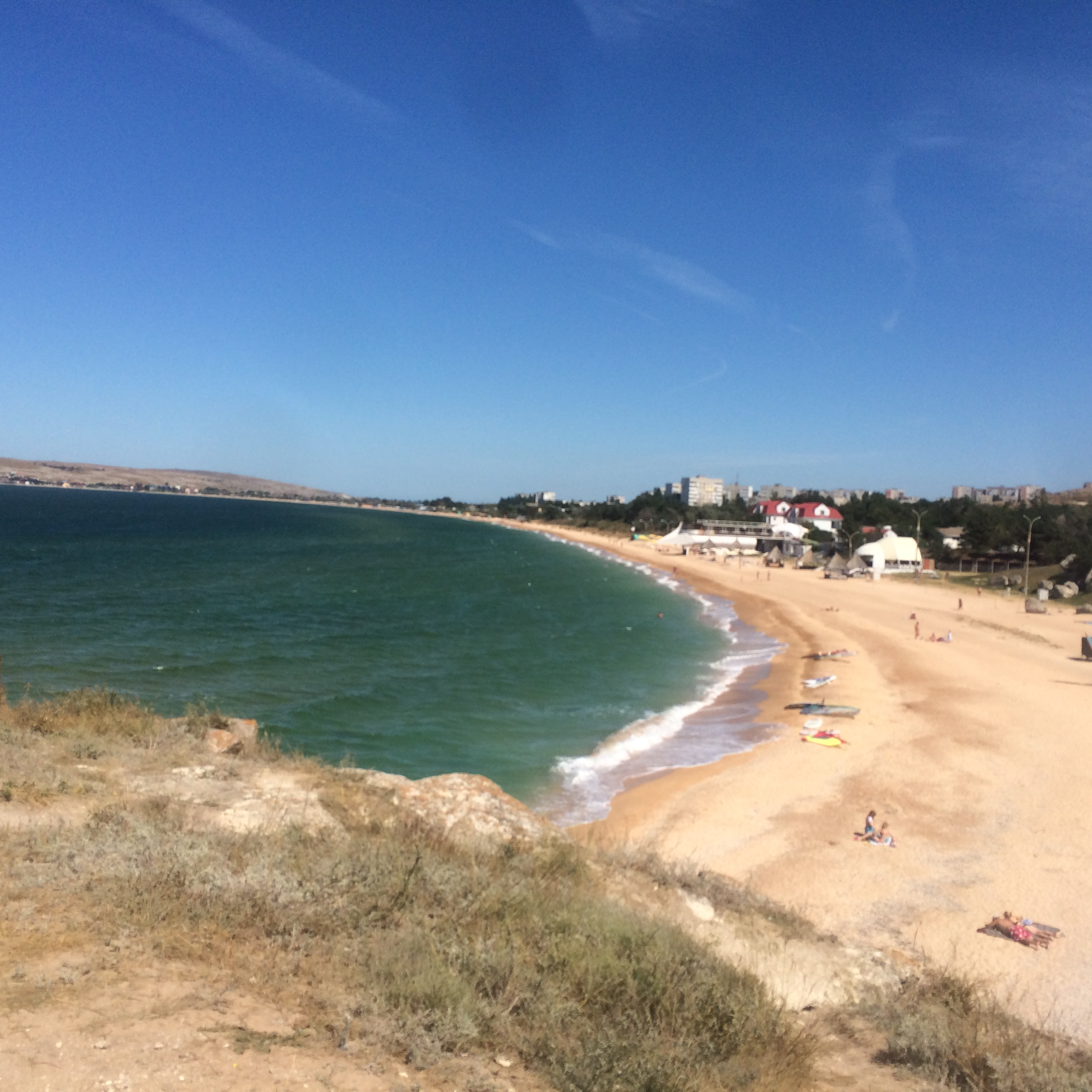 фото пляжа